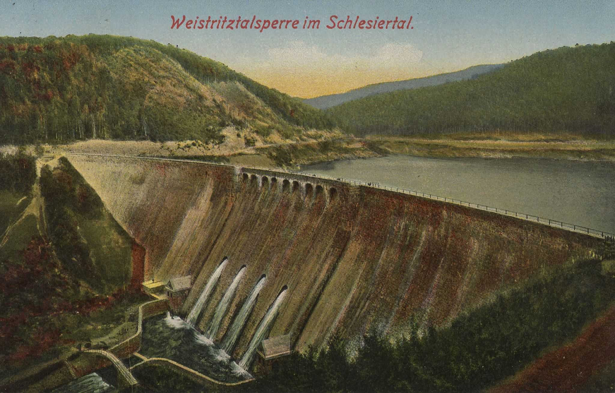 Zagórze Śląskie - zapora wodna na jez. Bystrzyckim, 1912-17 (w zespole elektrowni Lubachów I)